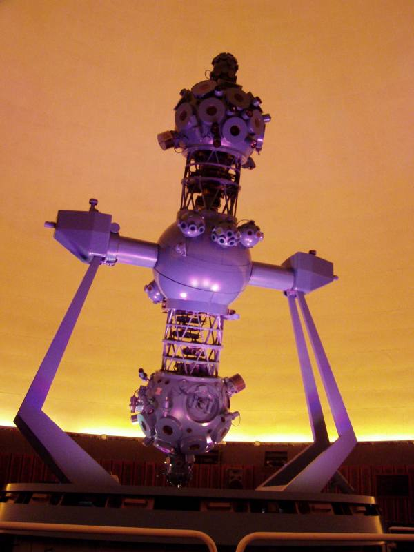 Projektor v sálu Cosmorama pražského planetária.